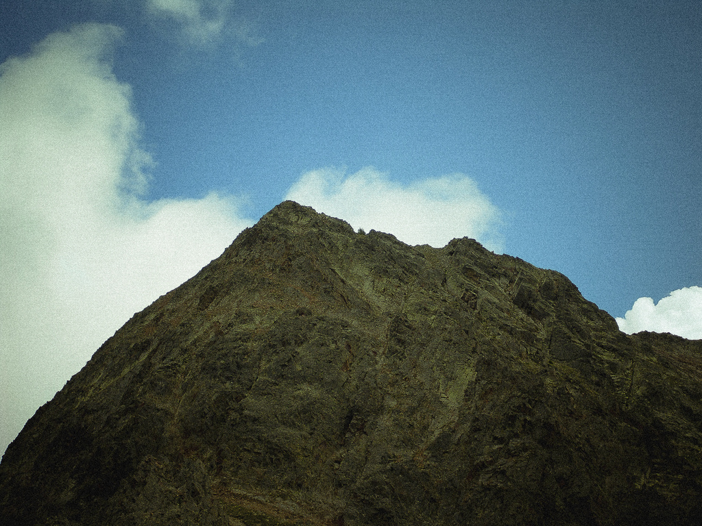 El Pic de Sotllo amb efecte lomo